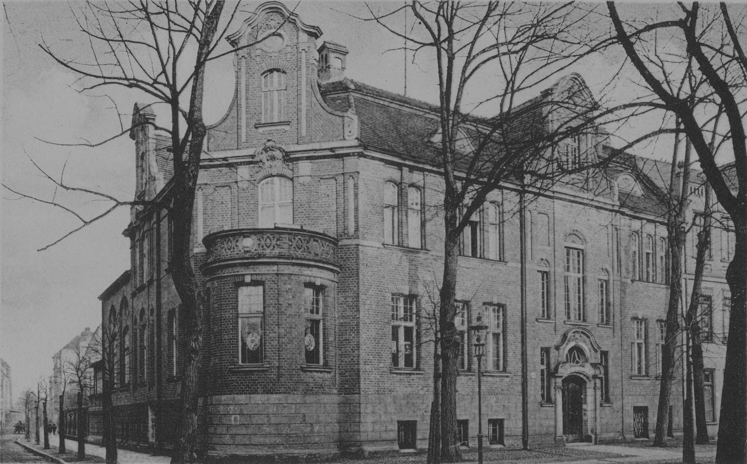 Nieistniejący budynek z 1909 pruskiego kasyna w Gdańsku, Langgarten 80 (ul. Długie Ogrody). W dwudziestoleciu międzywojennym siedziba Polskich Szkół Handlowych w Wolnym Mieście Gdańsku